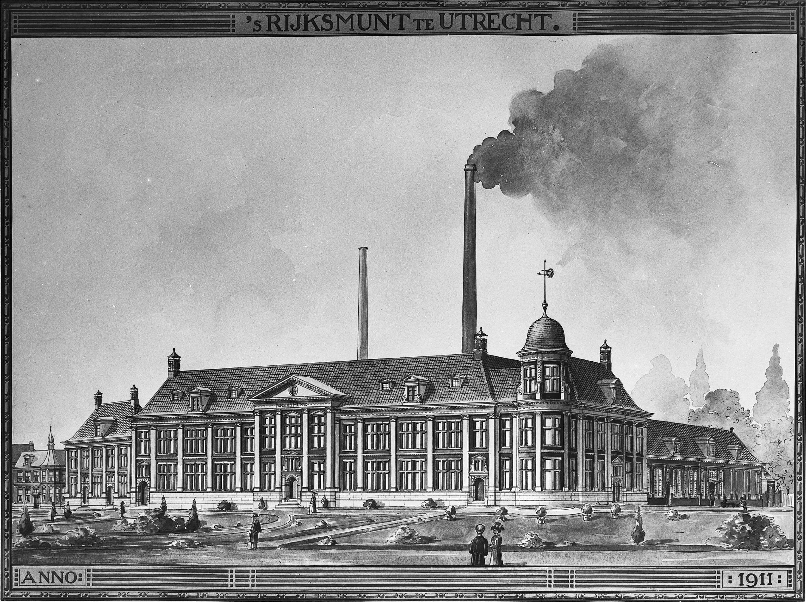 Rijksmunt: 's Rijksmunt exterieur 1911